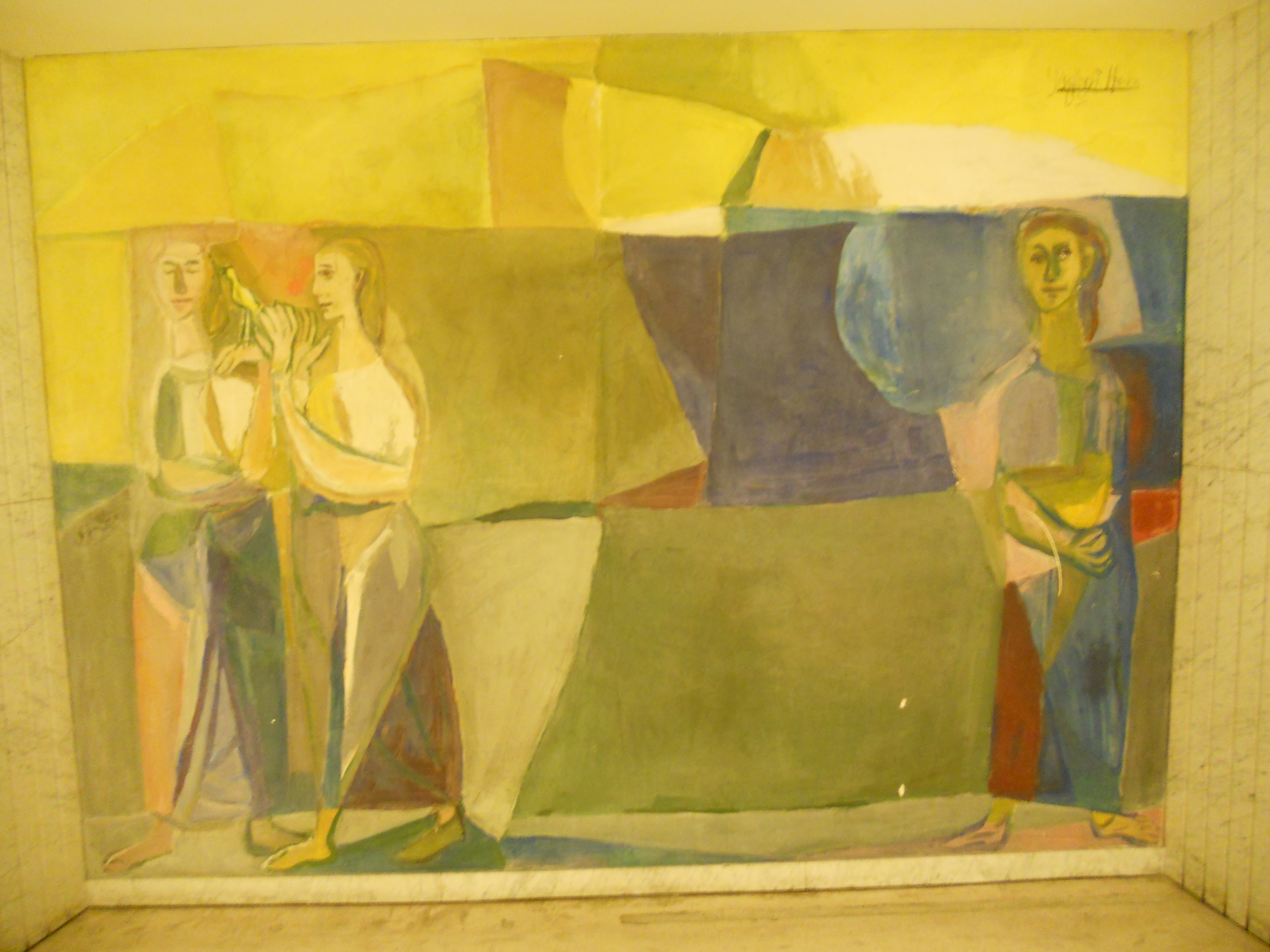 Wandgemälde von Giselbert Hoke in der Wiener Staatsoper, Balkon rechts